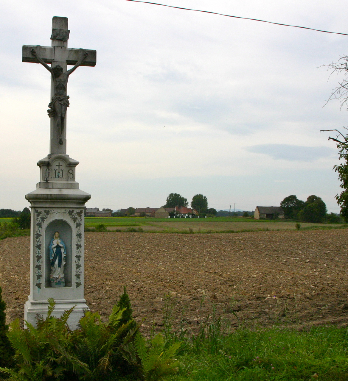 Czartowice (dodatkowa nazwa w j. niem. Schartowitz – wieś w Polsce położona w województwie opolskim, w powiecie prudnickim, w gminie Biała.